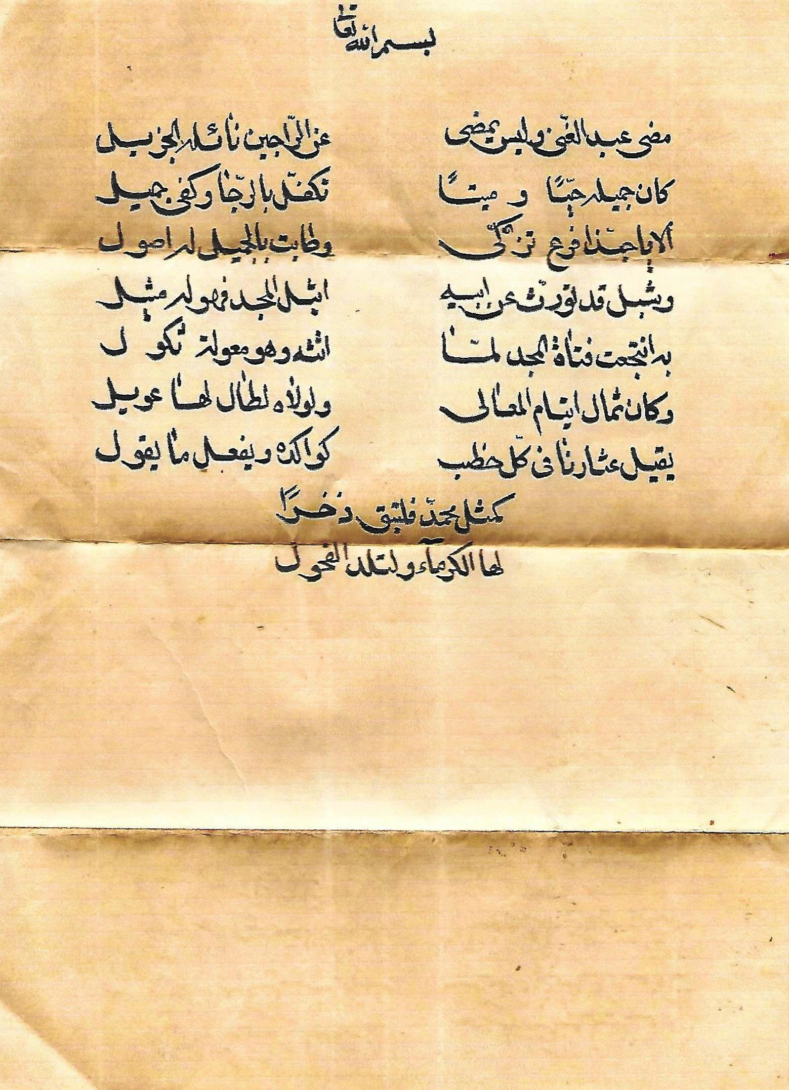 مخطوط يحتوي على أبيات شعر في رثاء للشيخ عبد الغني آل جميل مفتي بغداد وبلاد الشام في عهد الدولة العثمانية، والذي قام بثورة ضد الوالي العثماني علي رضا في بغداد عام 1832م، وتوفى في بغداد عام 1863م